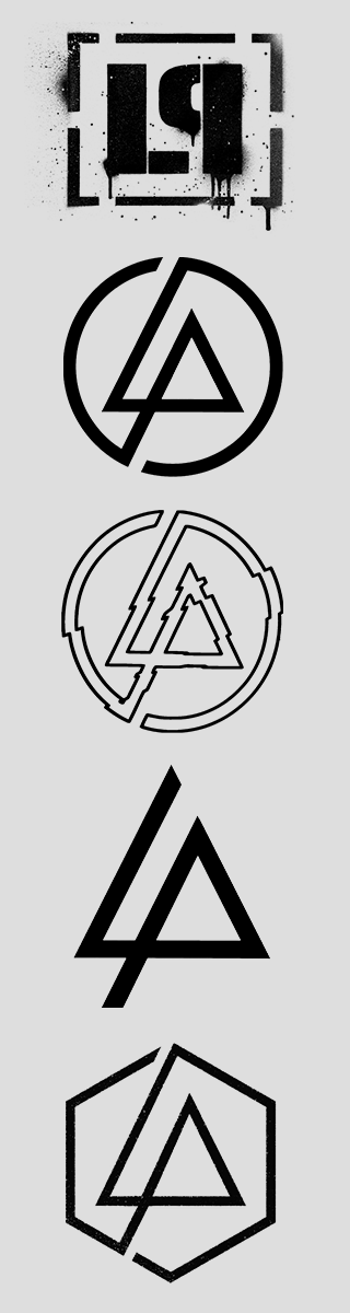 Logos empleados por Linkin Park a lo largo de los años.